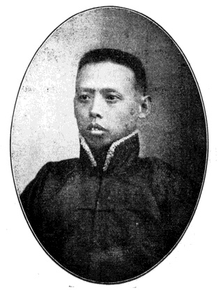 中文（台灣）: 中華民國國會議員